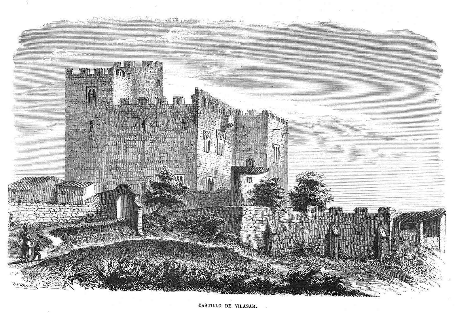 Castillo de Vilasar, en la revista española El Museo Universal.